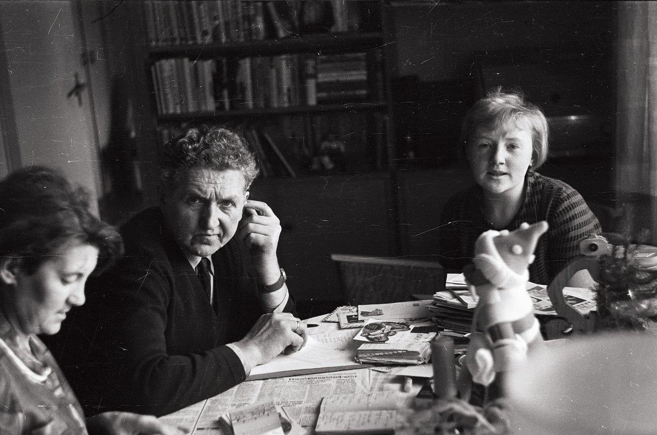 Elmar Arula Vinnis pereliikmete keskel koduses miljöös (ca 1967)